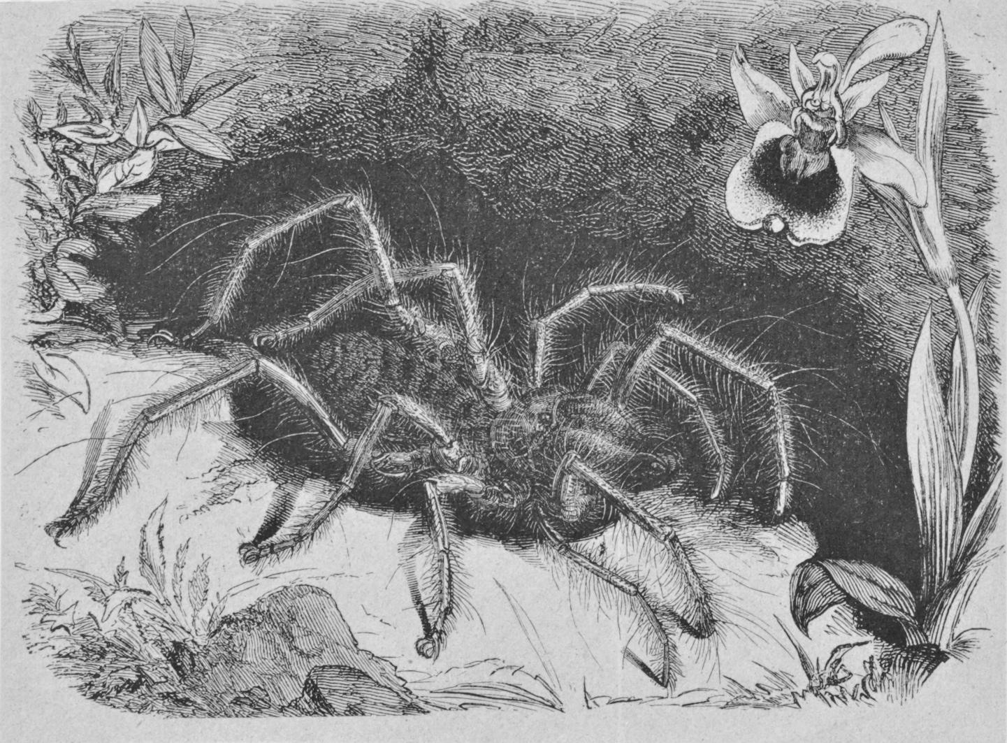 Galeodes